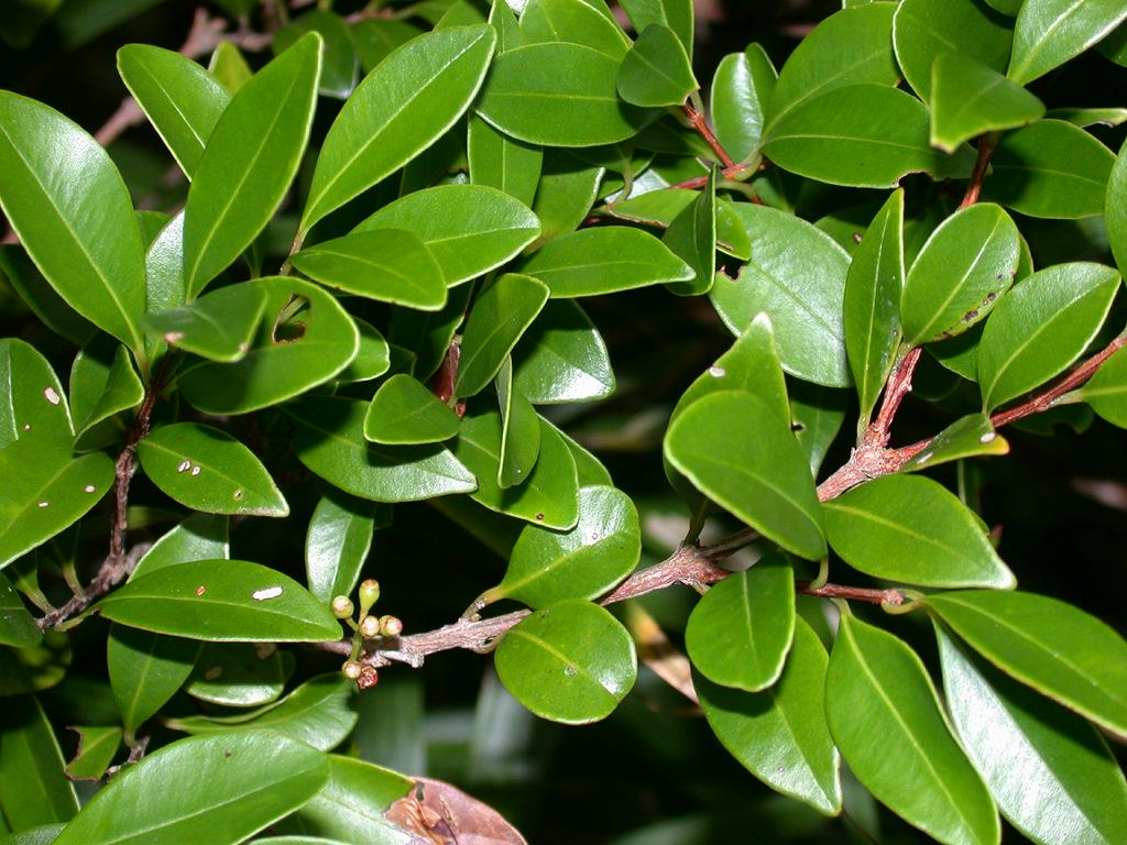 Syzygium buxifolium：アデク 2004/08/11 沖縄本島北部：Okinawa Island, Japan